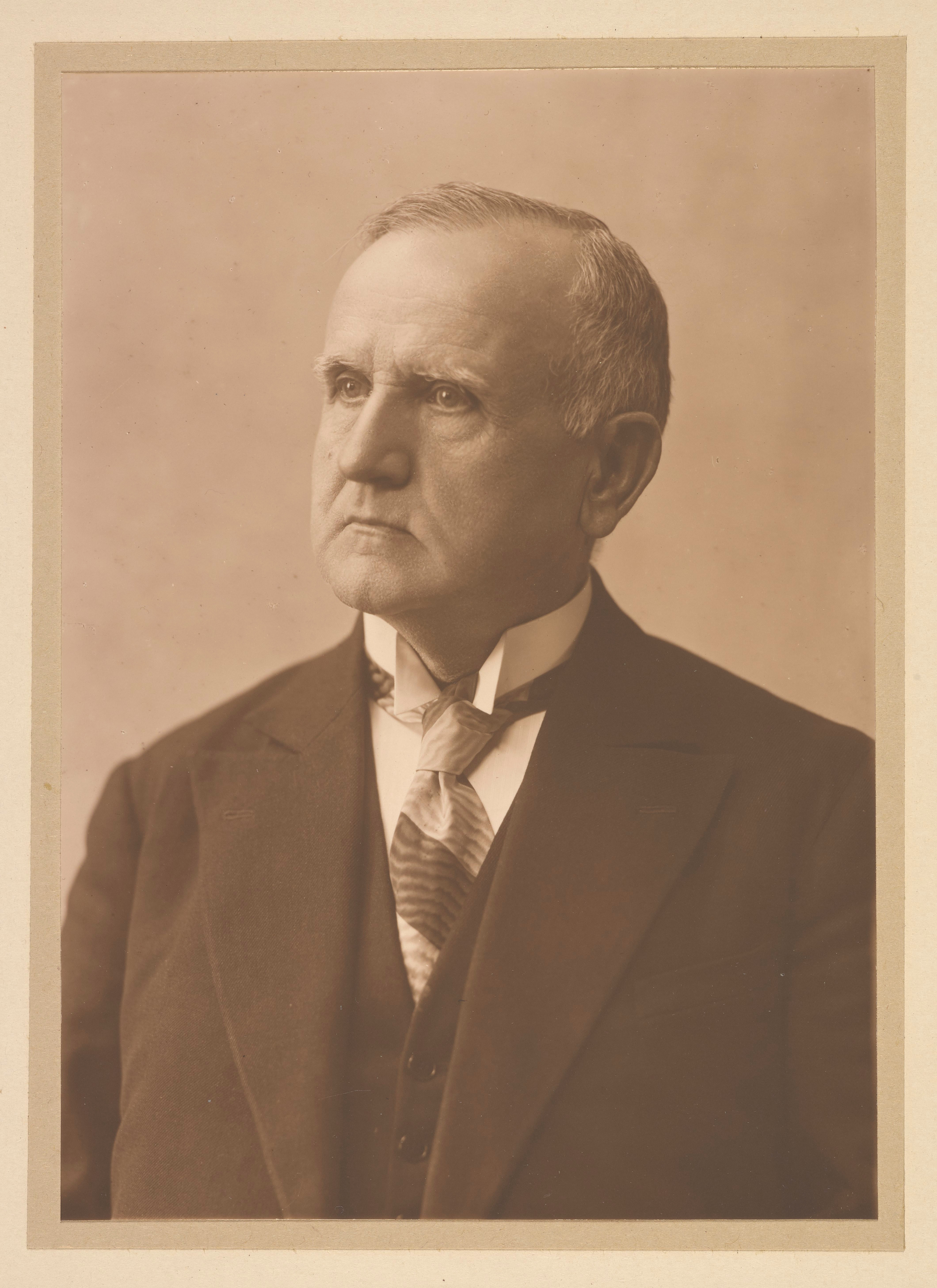 Ignacy Koschembahr-Łyskowski